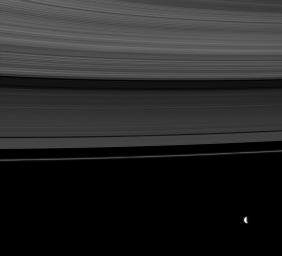 Mimas